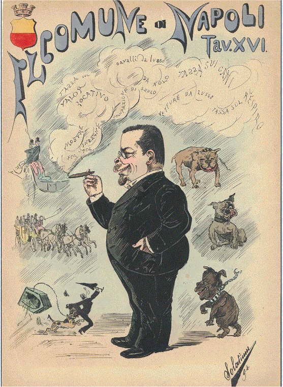 1894, Caricatura nobile napoletano, Solatium ripresa con cattura immagini dal sito Famiglia Ferraro di Silvi e Castiglione